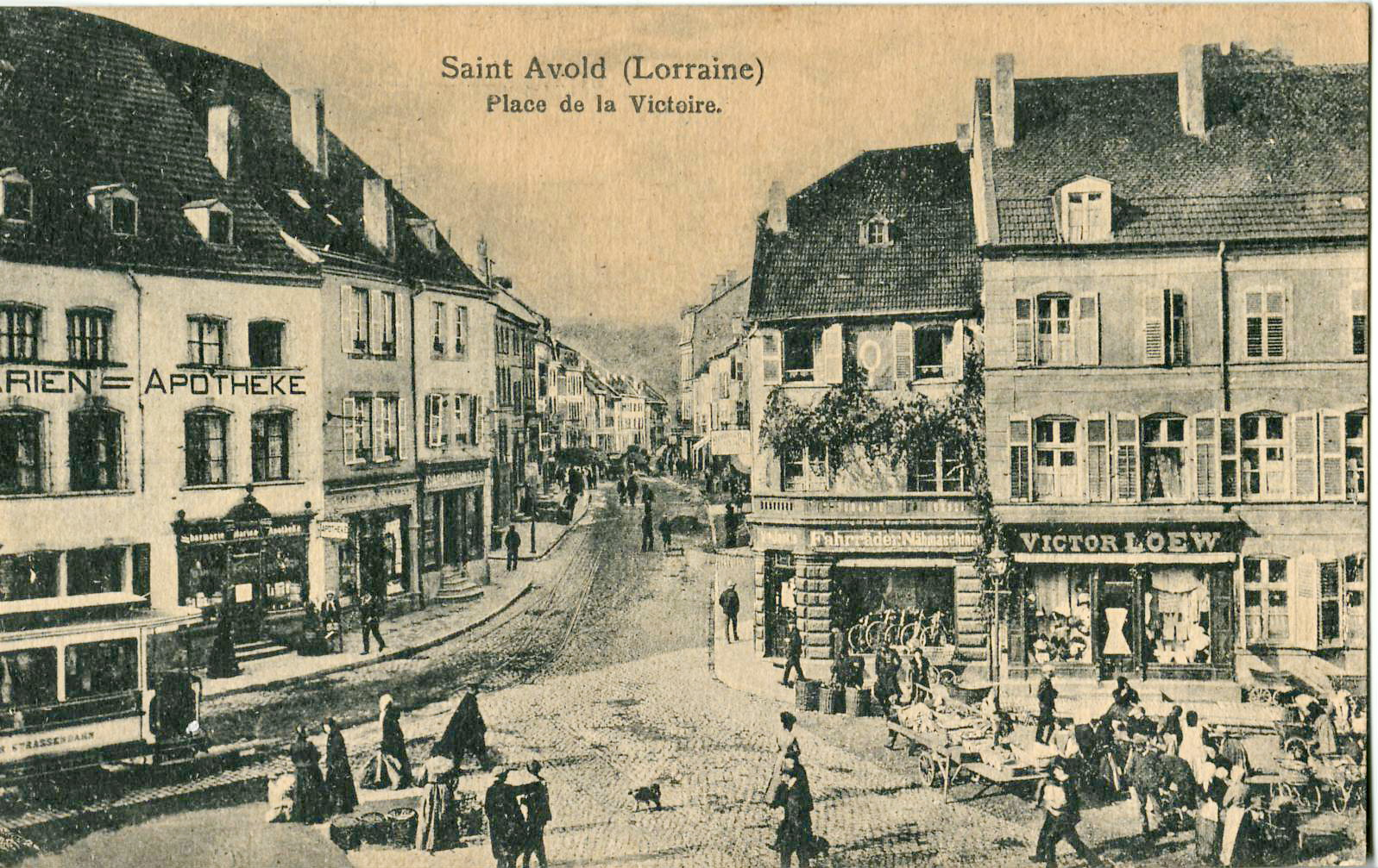 Carte postale ancienne sans mention d'éditeur : SAINT-AVOLD - Place de la Victoire